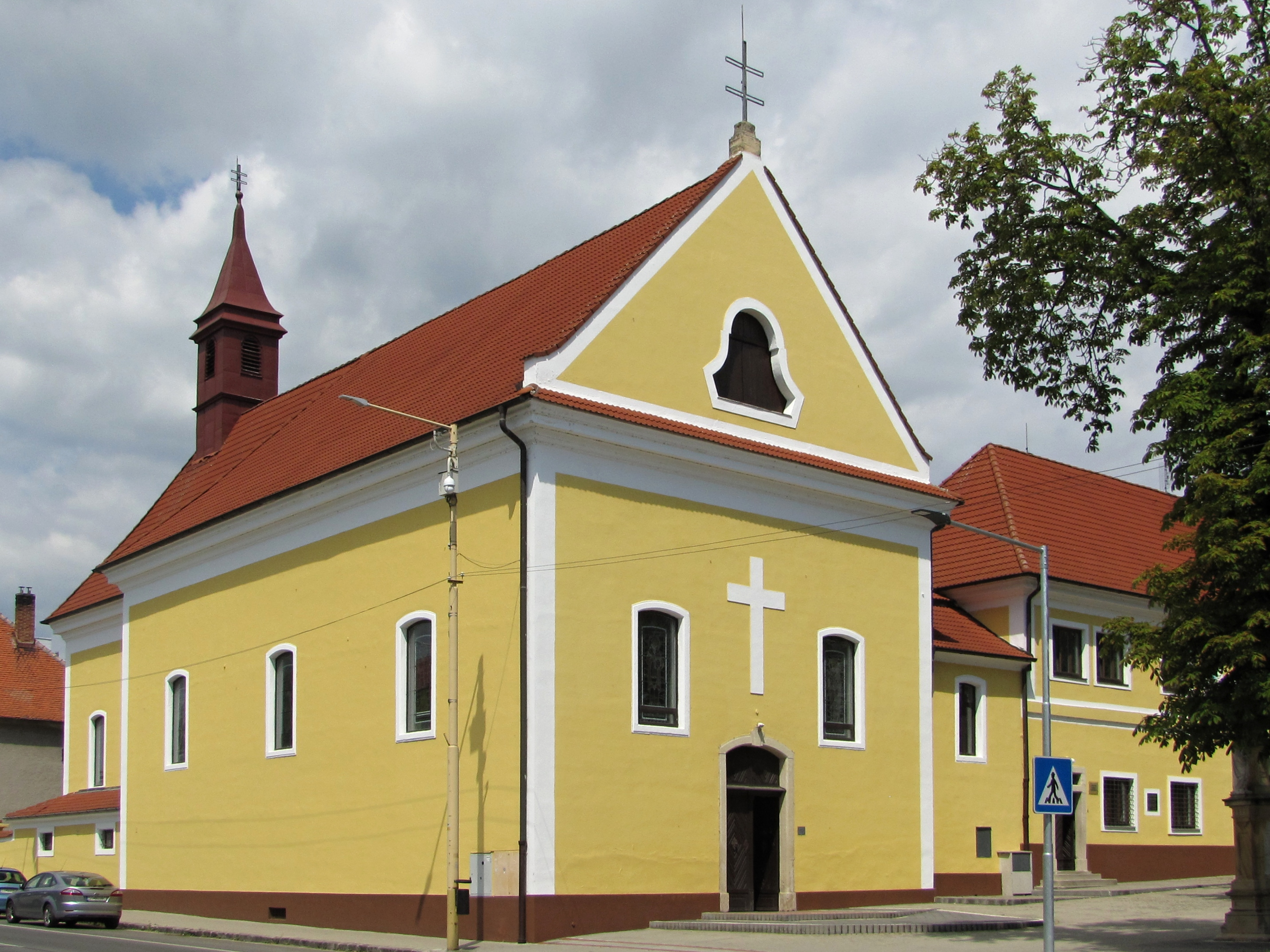 Kostel svatého Martina v Holíči, dříve kapucínský kostel svatého Františka z Assisi z let 1752–1755